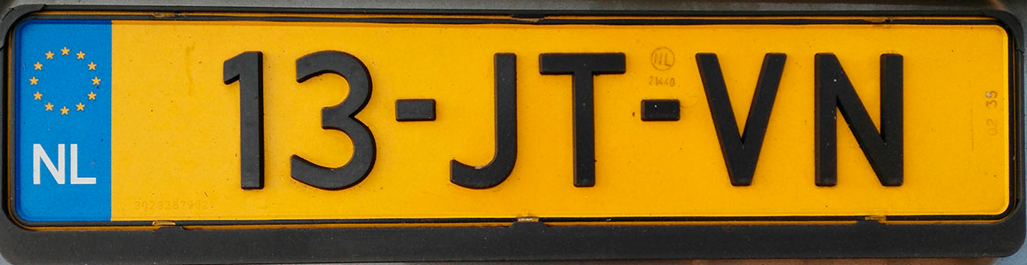 Model matrícula per automòbil durant període 1999-2008.